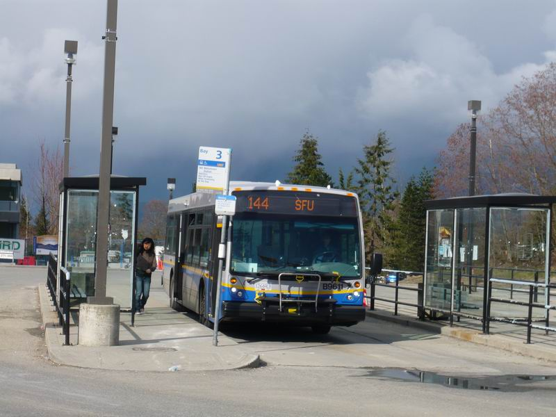 Burnaby Bus